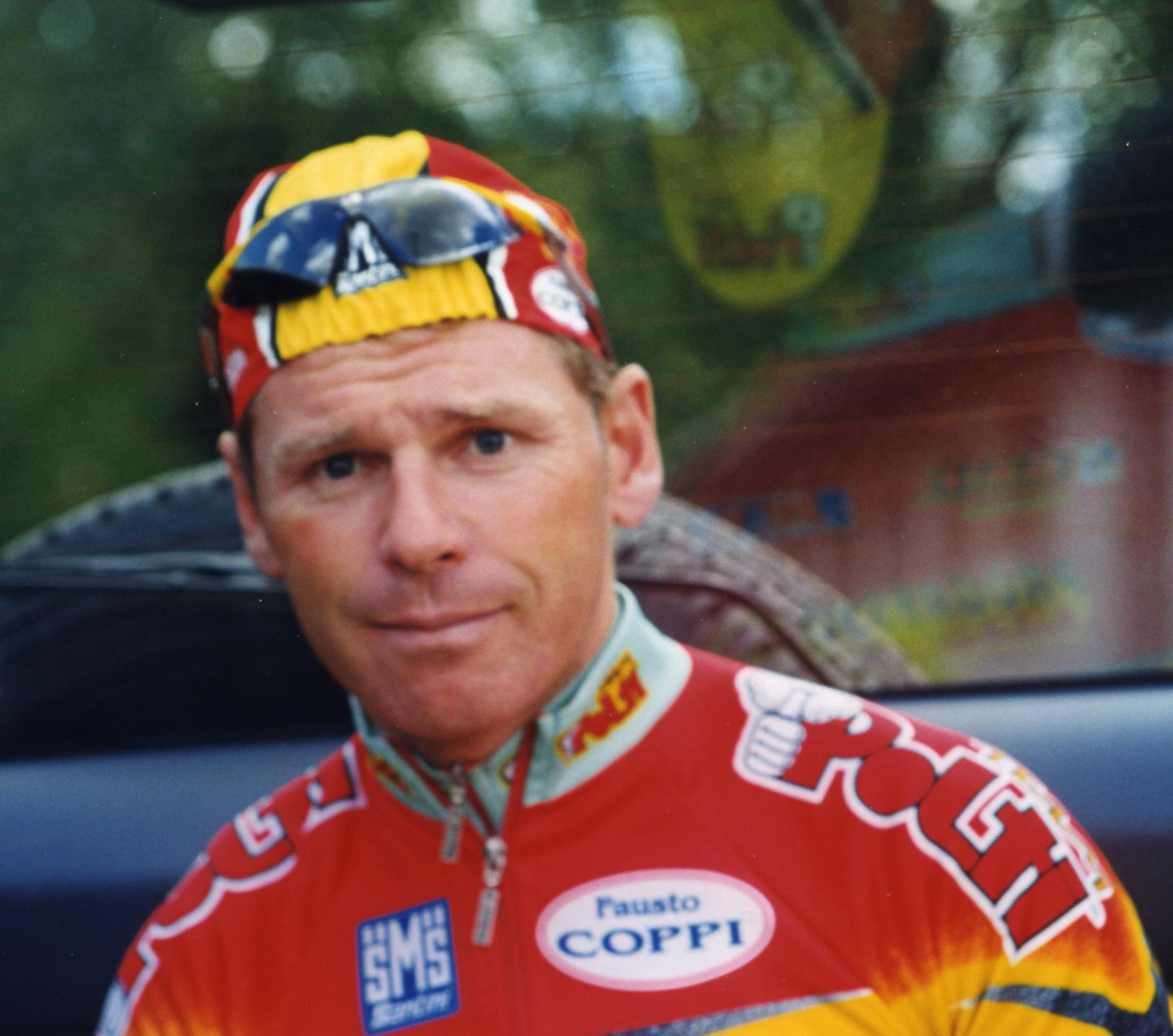 AU CRITERIUM DE LEVES 2000